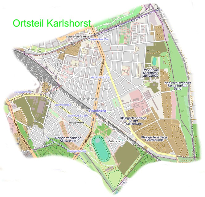 Ortsteil Berlin-Karlshorst aus OSM , geringfügig nachbearbeitet